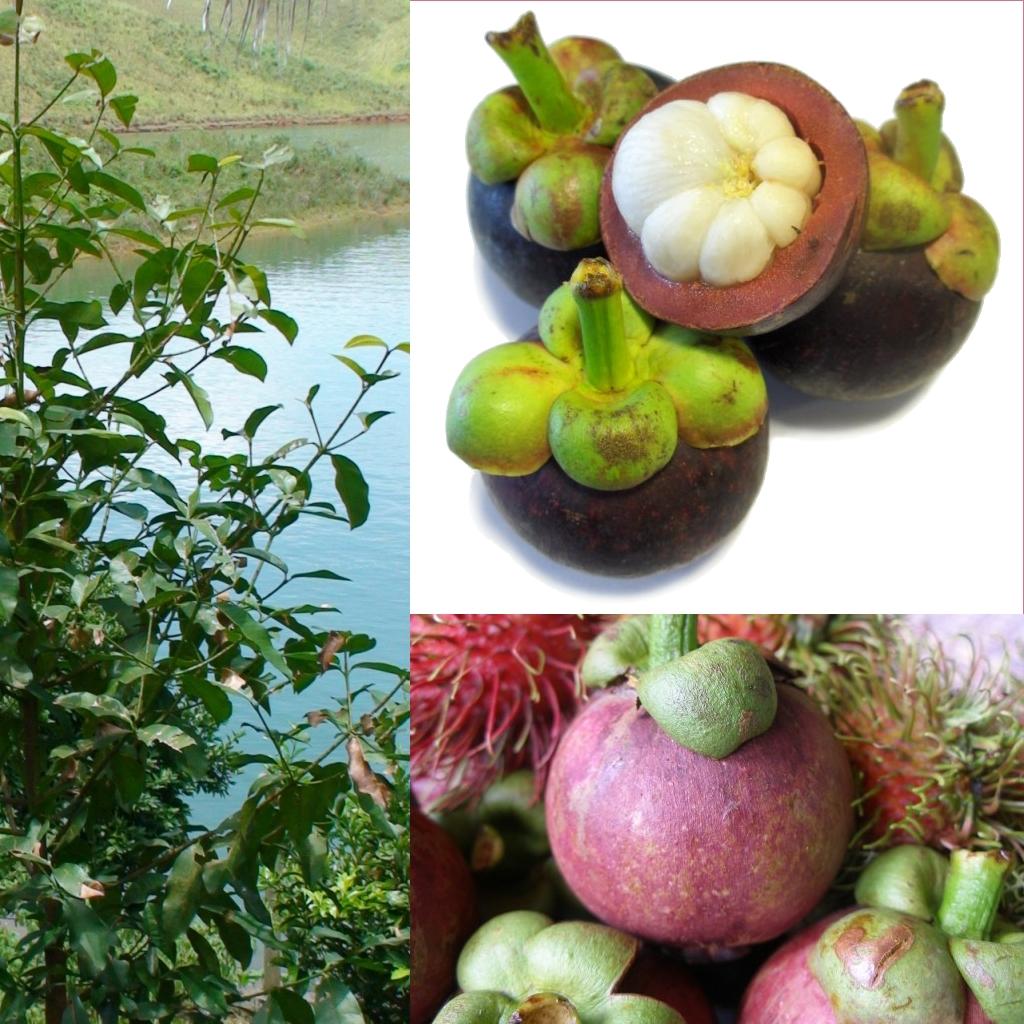 Grafika podręcznika Wikijunior:Owoce. Mangostan, smaczelina, garcynia, owoc mangostanu właściwego (Garcinia mangostana).